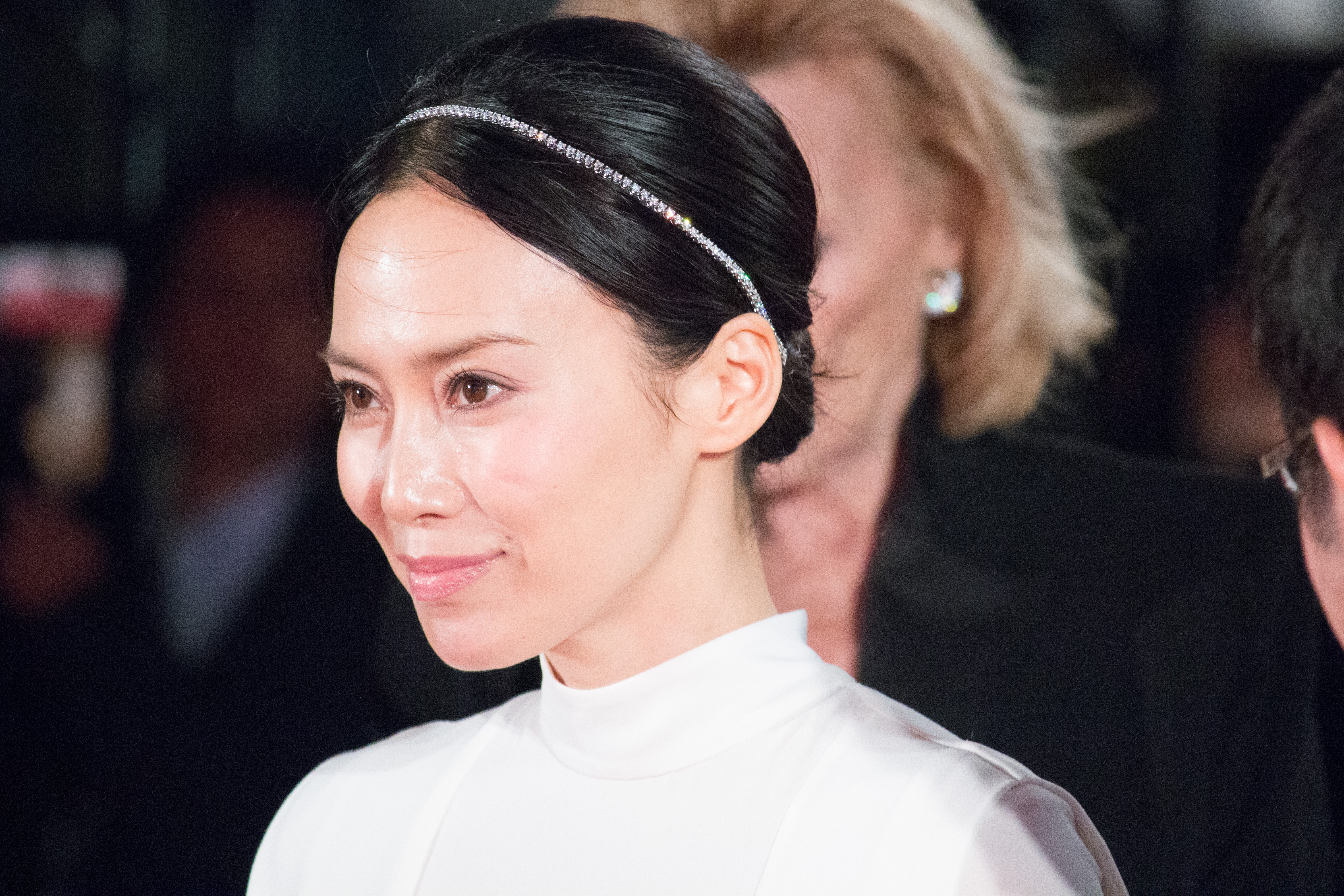 第28回 東京国際映画祭 オープニングセレモニー 中谷美紀 (Foujita)